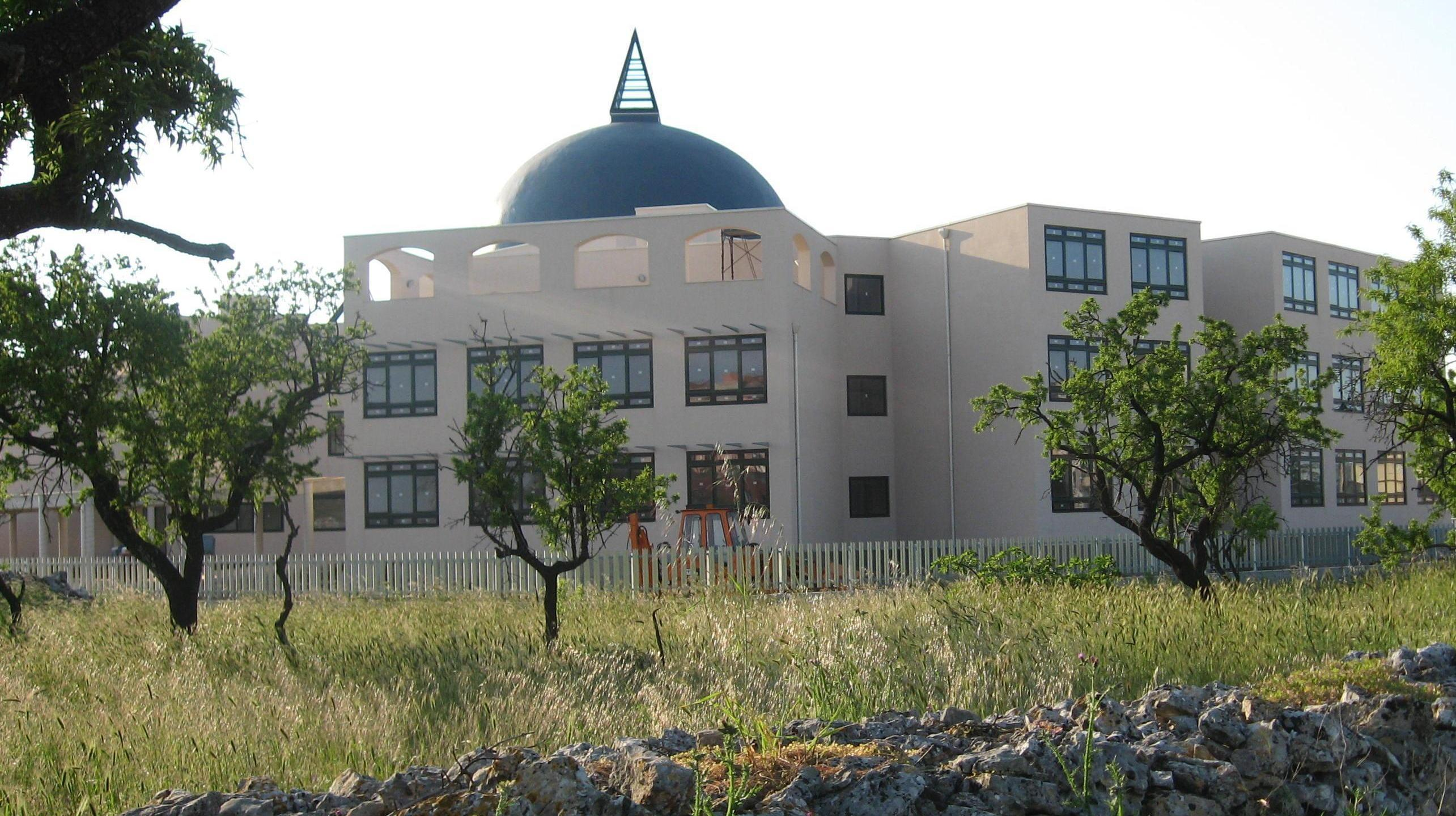 Nuovo Liceo Scientifico Einstein Mottola